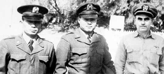 미국 오클라호마주 포트실 미 포병학교에 유학 중 (오른쪽 첫번째가 박정희)